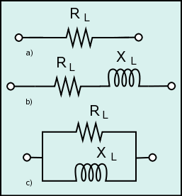 Circuitos equivalentes de una bobina (Coil's equivalent circuits)